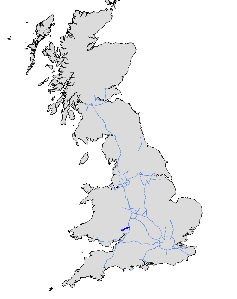 M50